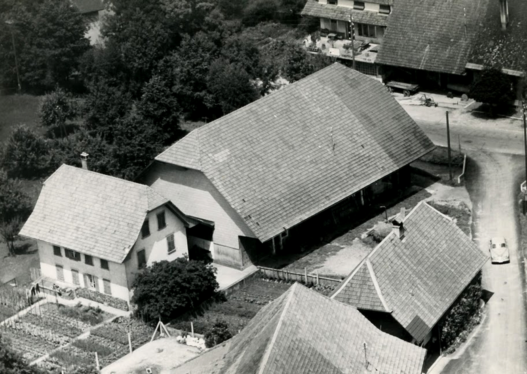 Derendingen Kreuzung Biberiststrasse mit Hauptstrasse Bauernhöfe Guggisberg und Kunz, Luftaufnahme 1965